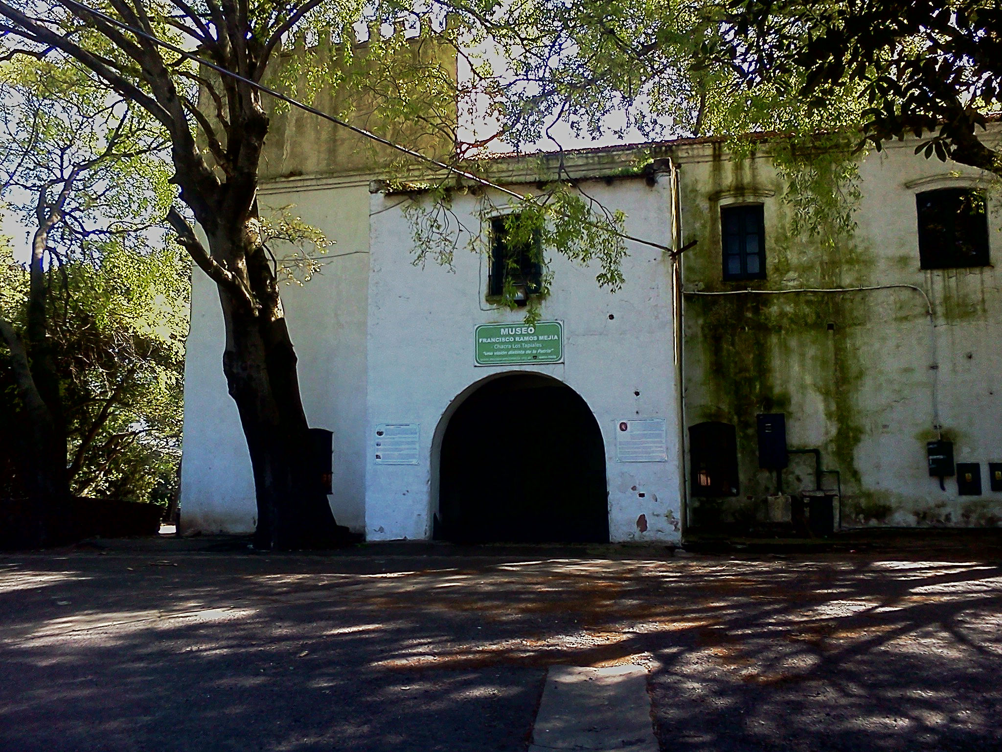 Entrada al patio lindero a la antigua hacienda.